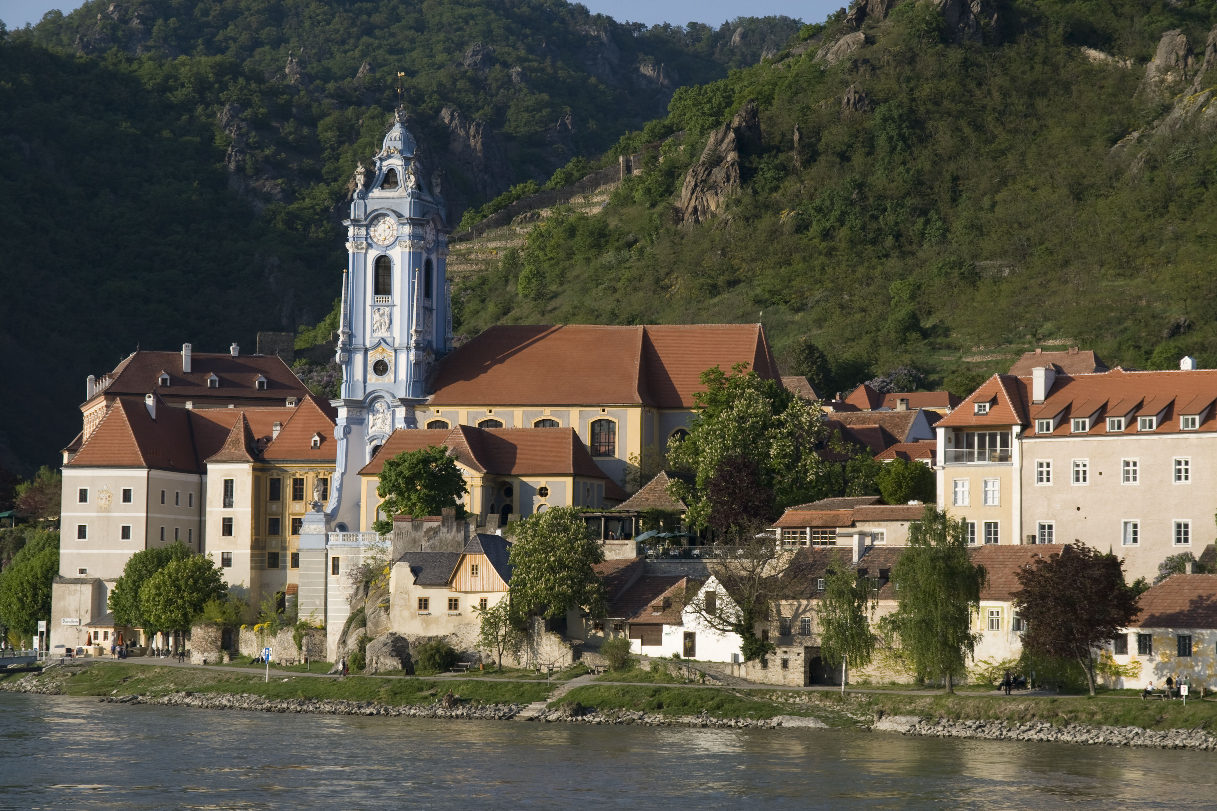 Dürnstein Panorama